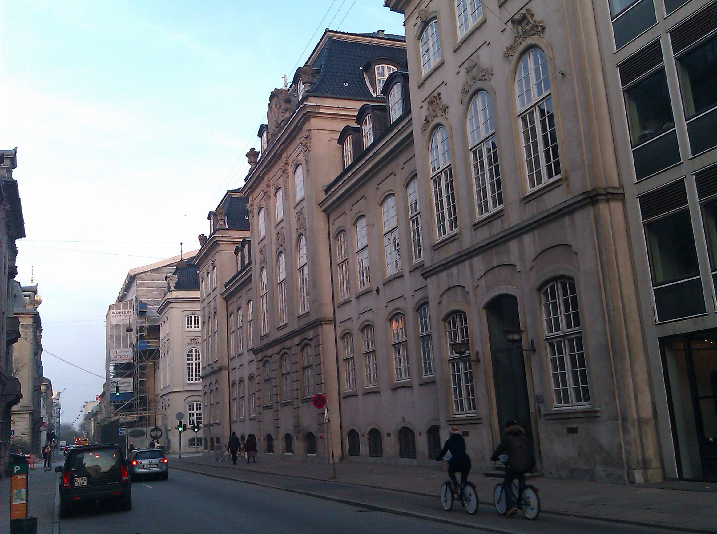 Bernstorffs Palæ, Bredgade, København